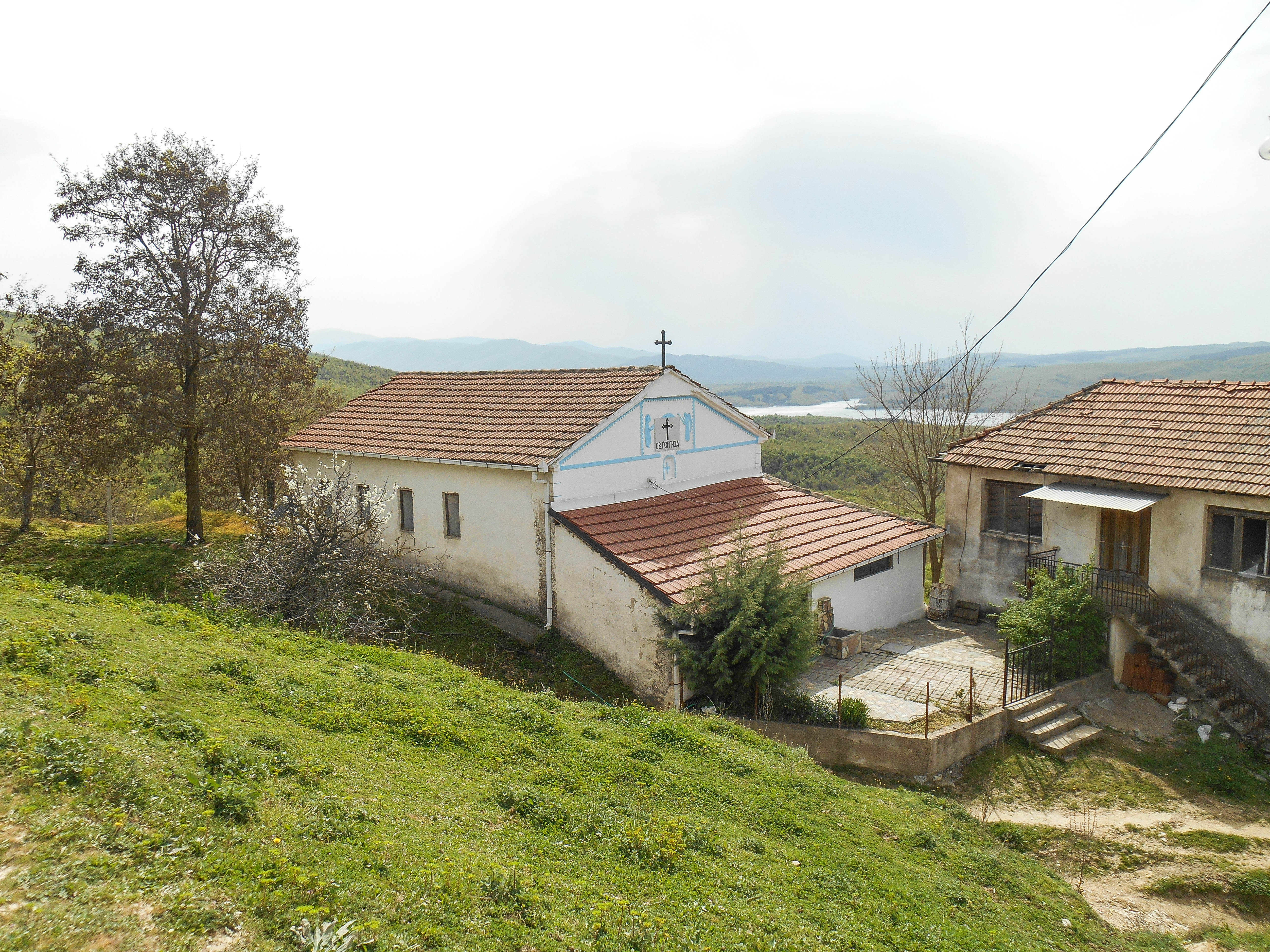 Црква Свети Ѓорѓи